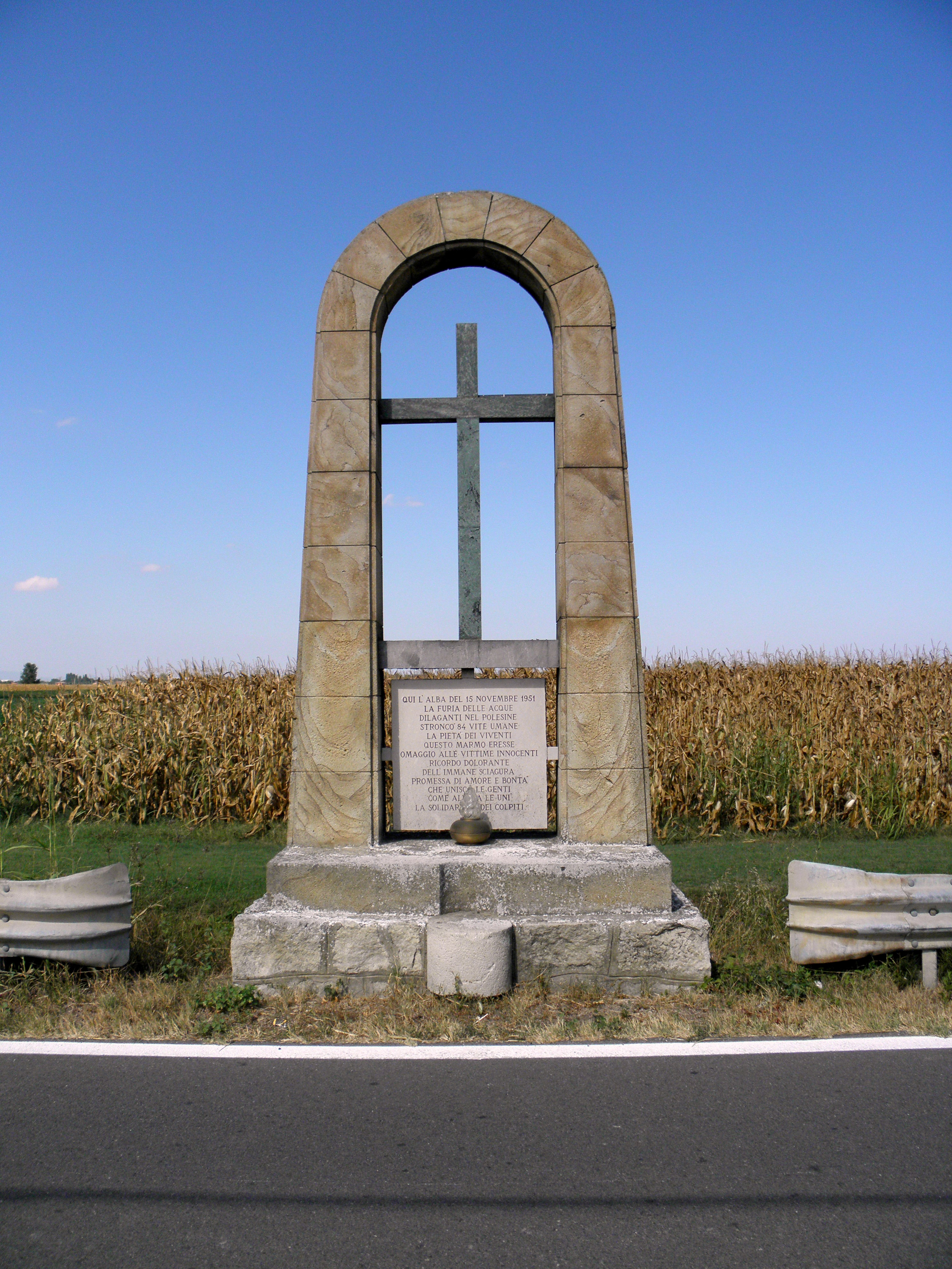 Chiesa, frazione di Frassinelle Polesine: il monumento commemorativo degli 84 morti durante l'alluvione del Po del 1951.